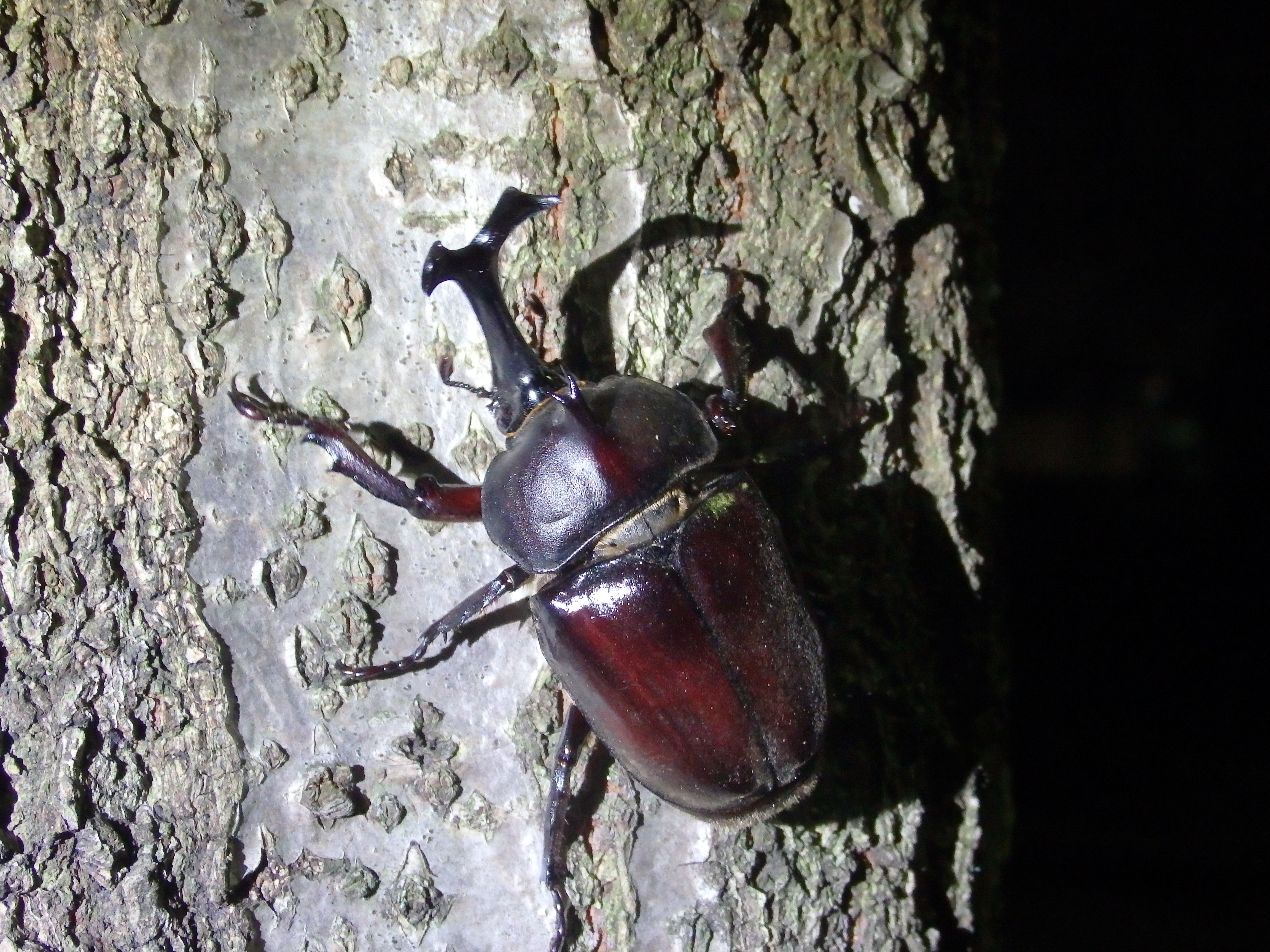 撮影地：東京都